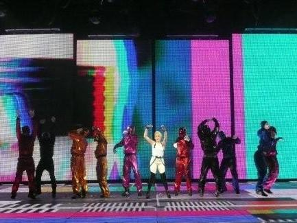 KylieX2008